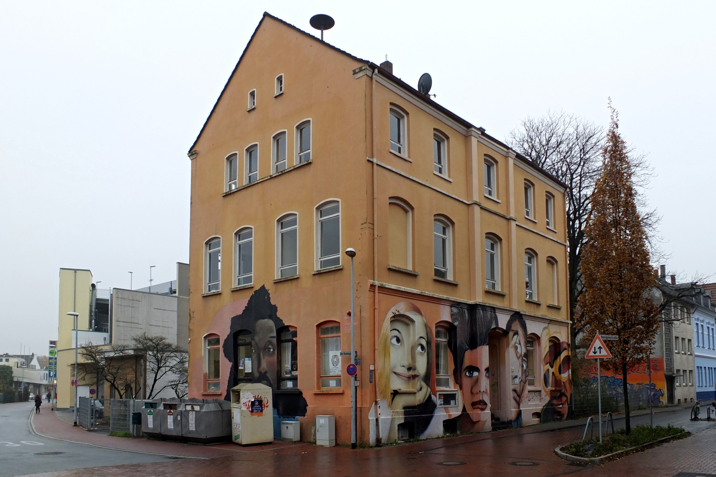 Jugendtreff JuEck, früher Volksschulgebäude, an den Fassaden 9 Werke von Dominik Hebestreit, Hilden, Heiligenstraße 13